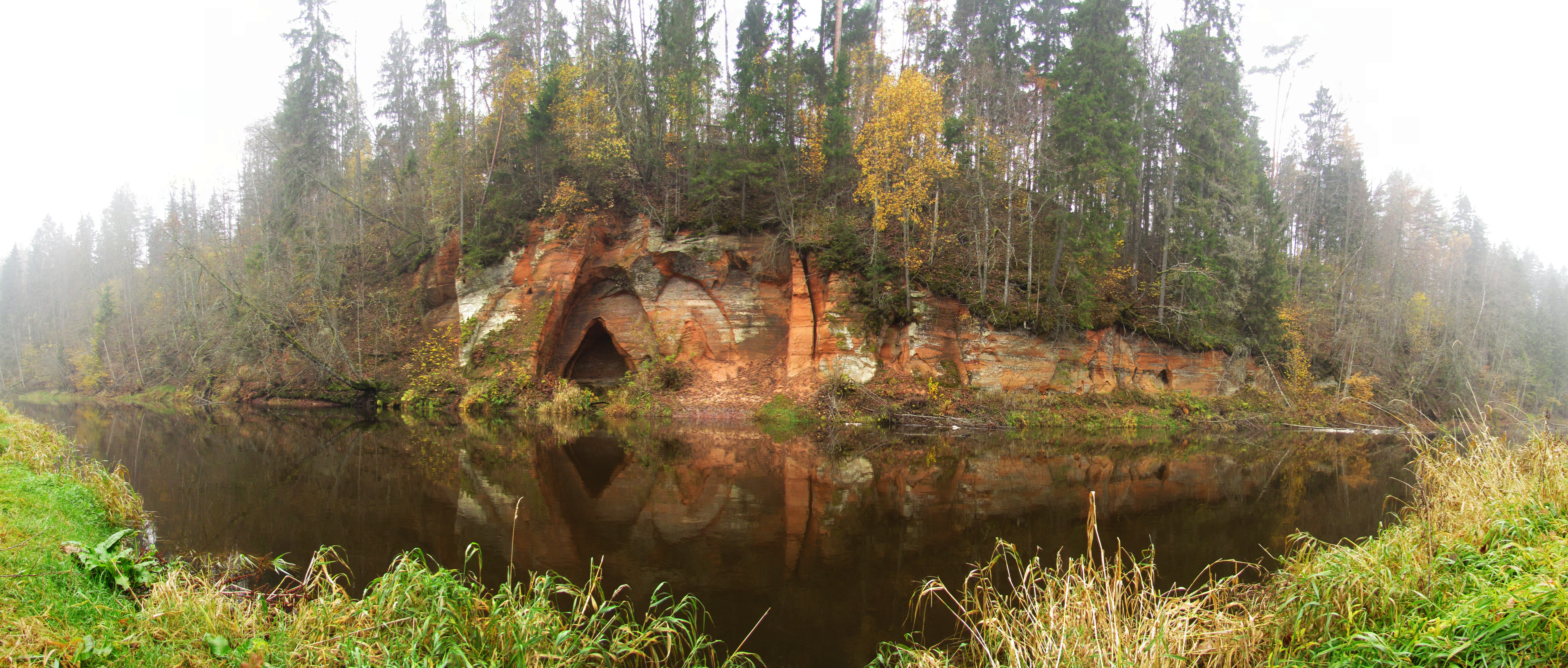 Enģeļu klints